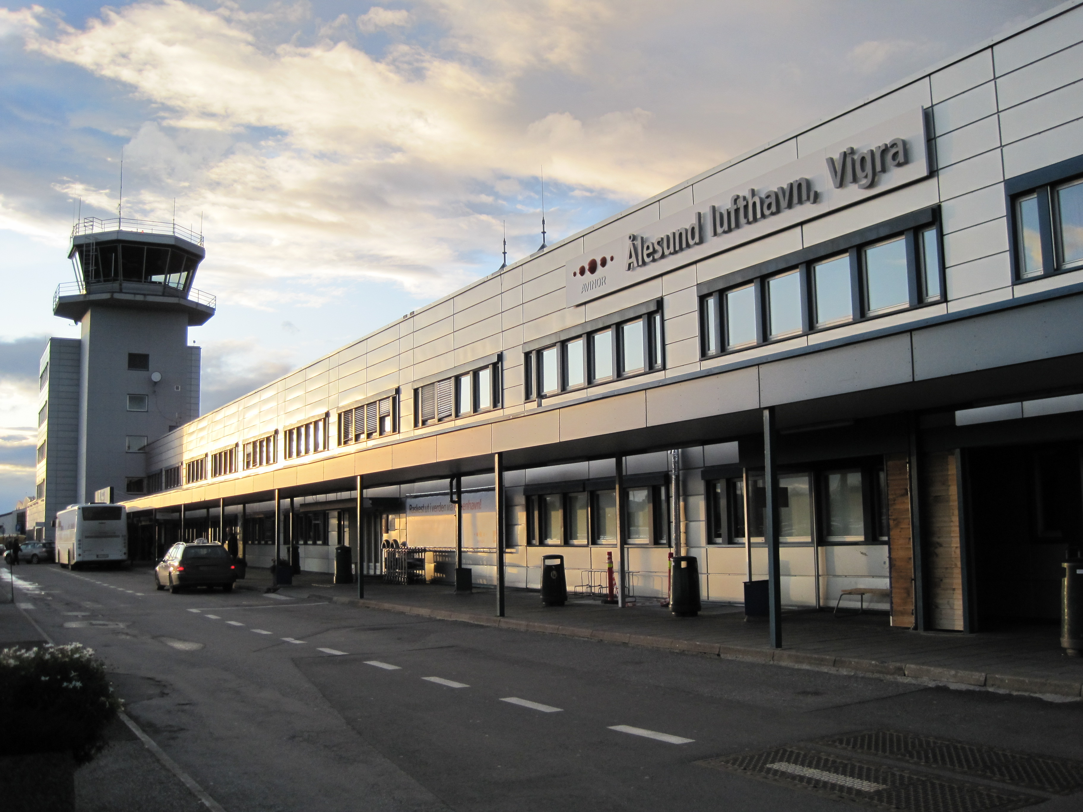 Inngansparti til Ålesund Lufthavn Vigra AES.